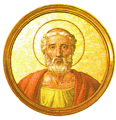 Papież Liberiusz